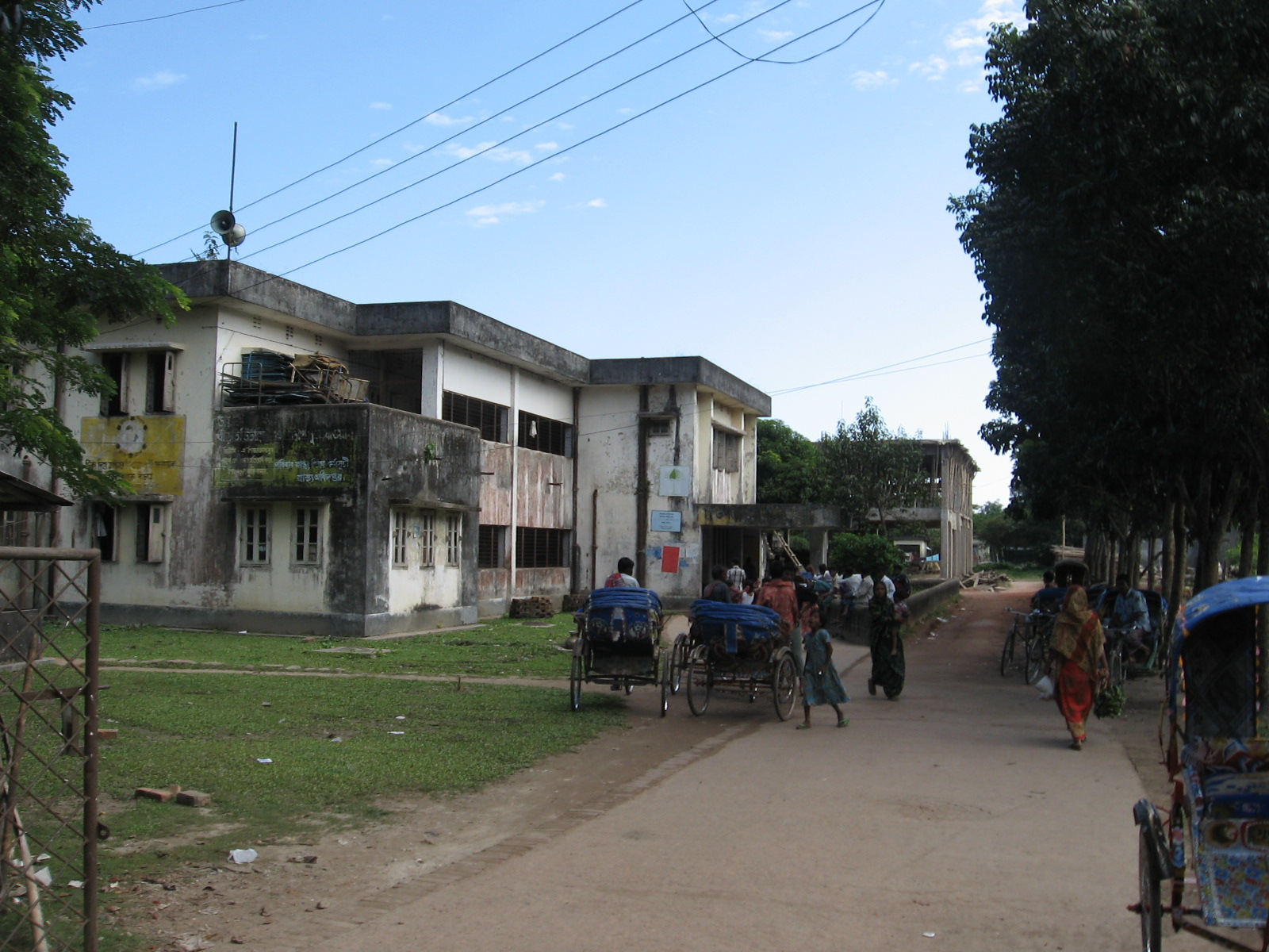 Hospital at Mohanganj